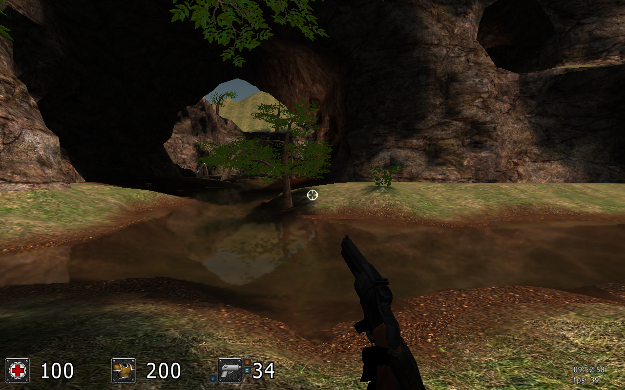 Скриншот игры Sauerbraten